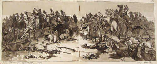 Альбом малюнкаў, прысвечаных Першай імперыялістычнай вайне. Нямецкая кавалерыя, якую праследуе агонь нашых кулямётаў. 1916. Папера, акварэль, тушь. 27,5х55.